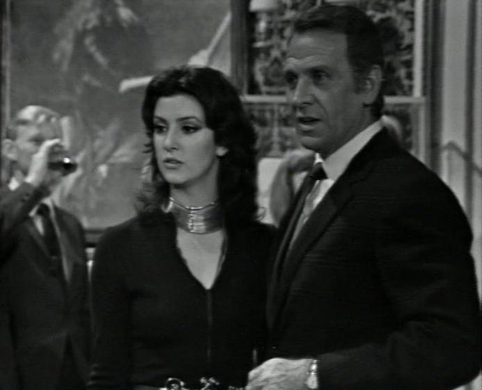 photo from Italian TV-movie Il segno del comando (1971)